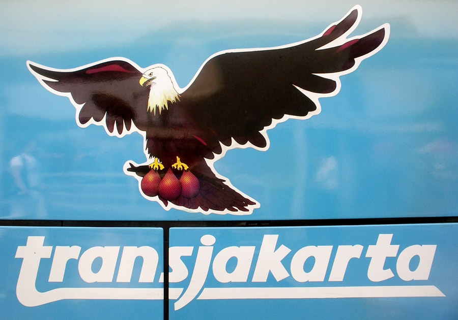 Das auf einem Bus angebrachte Logo von TransJakarta .